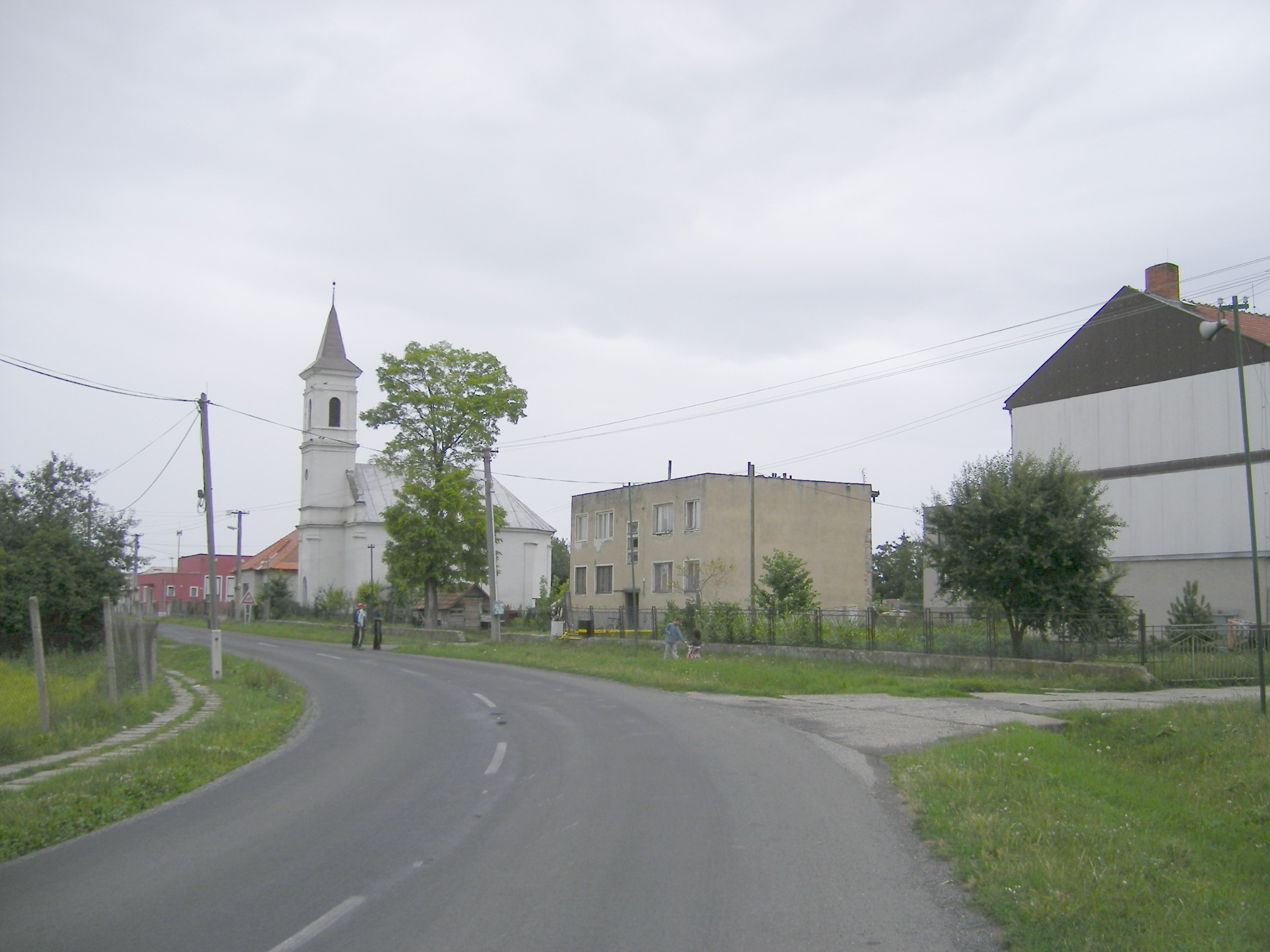 Bajka (okres Levice)